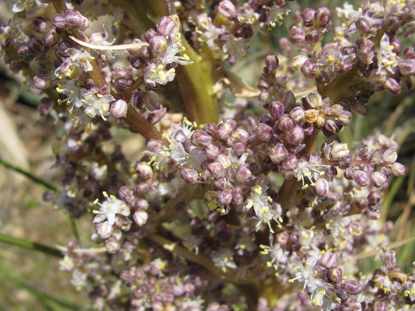 Nolina texana in Blüte in Kultur